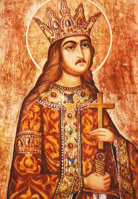 Portrait d'Etienne le Grand